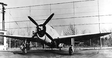 Republic XP-47E